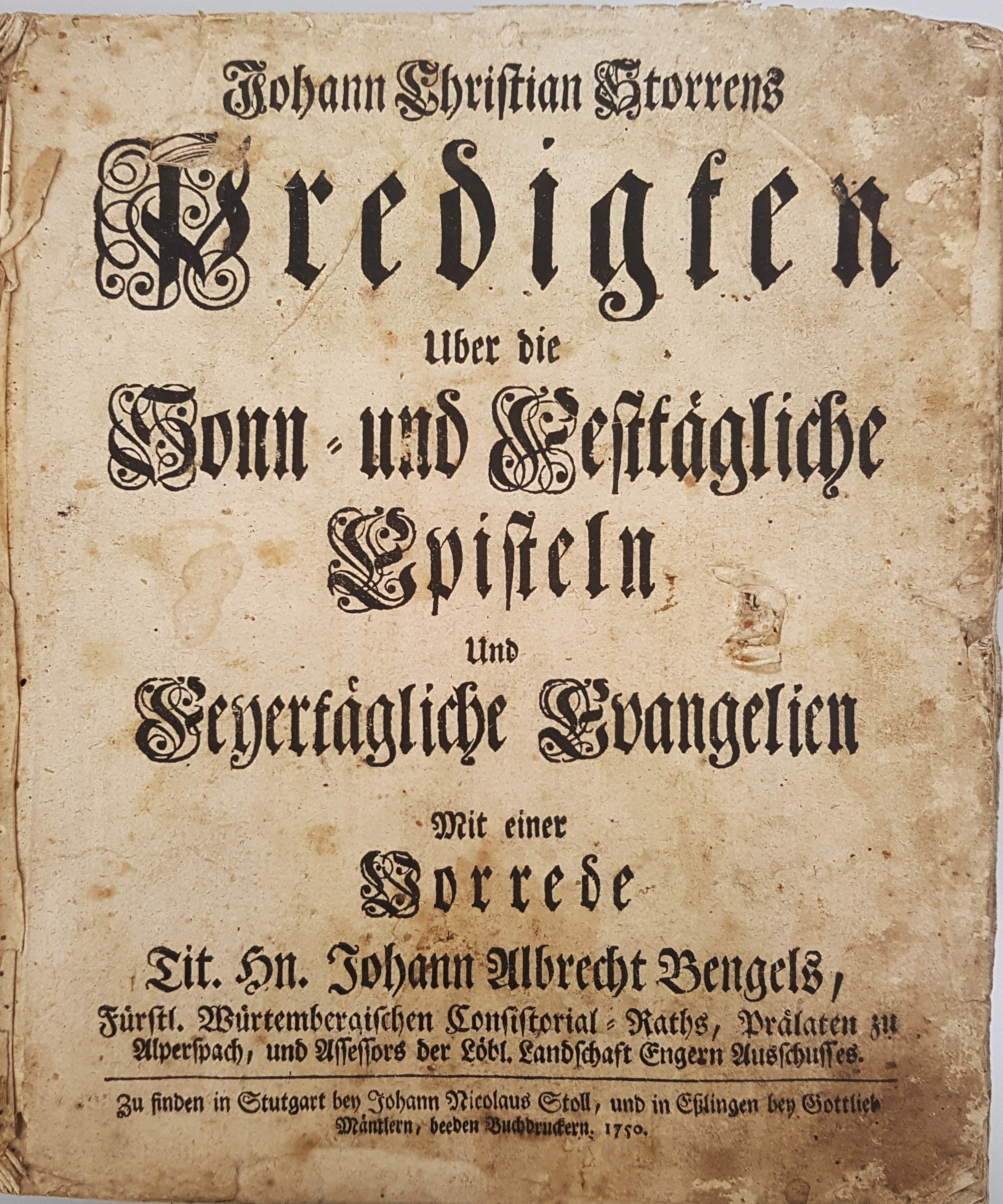 Johann Christian Storrens Predigten Uber die Sonn- und Festtägliche Episteln Und Feyertägliche Evangelien, 1750 (Titel)